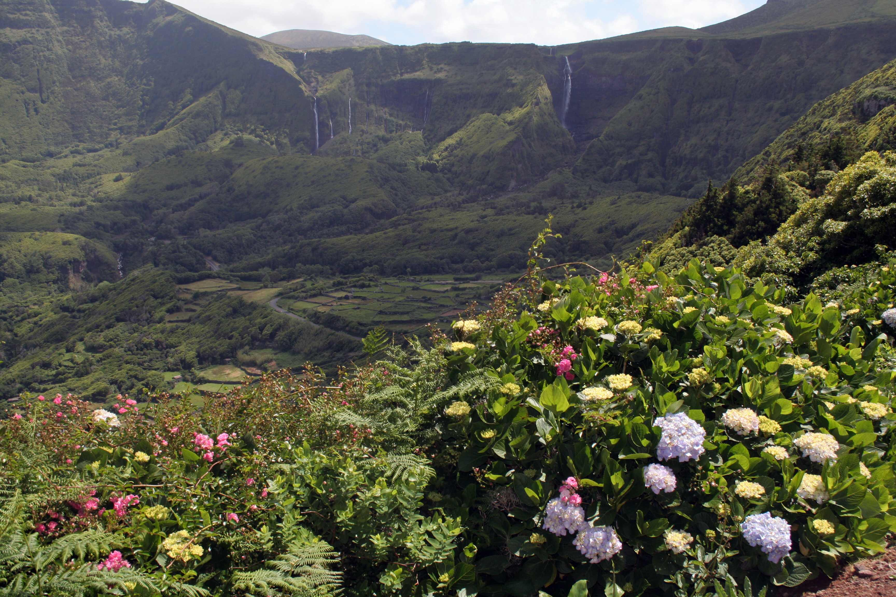 Flores, Bergmassiv oberhalb Faja Grande